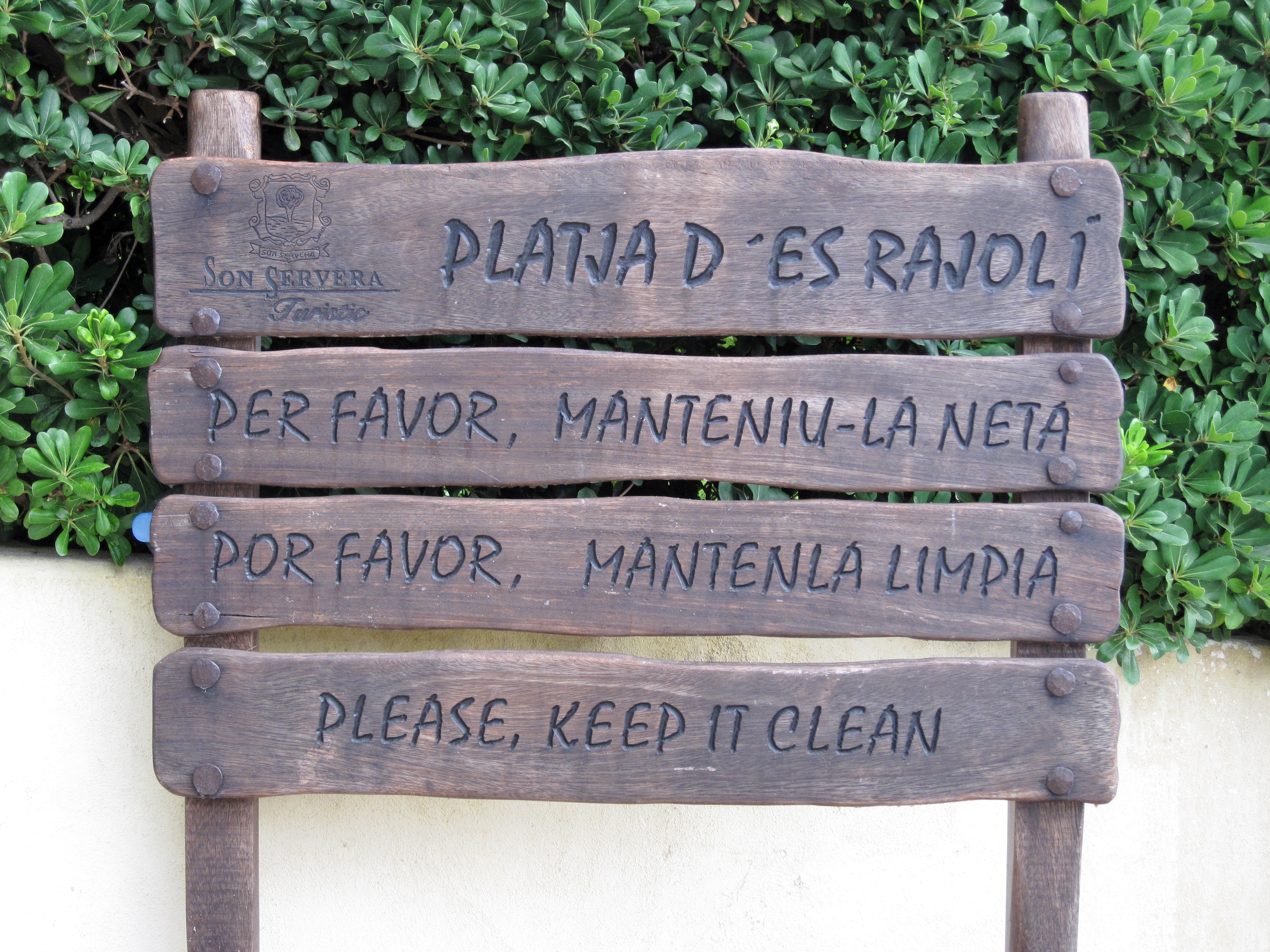 Hinweisschild vor der Platja des Rajolí, einem kleinen Strand an der Küste der Gemeinde Son Servera, Mallorca, Spanien